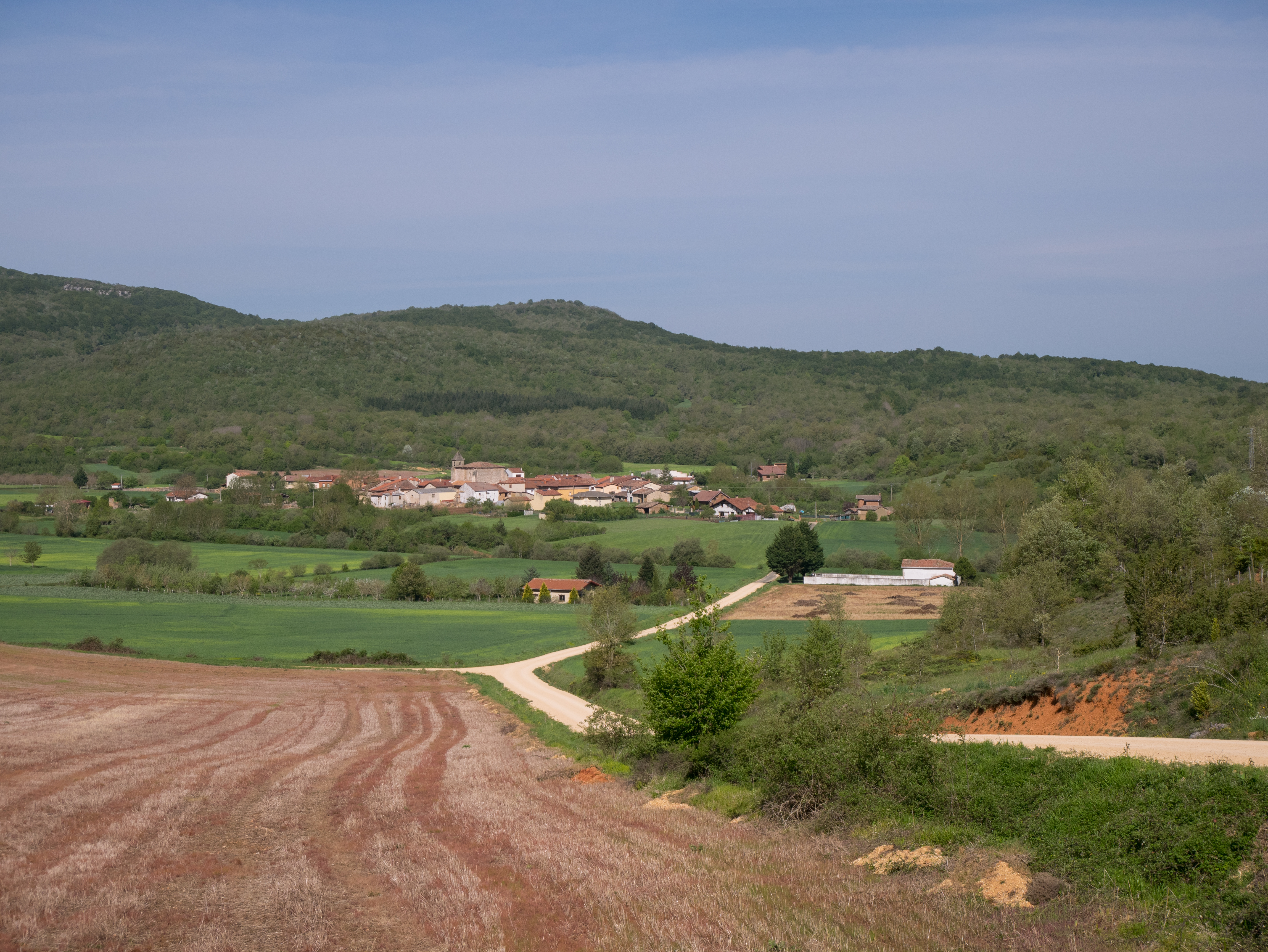 Vista de Pipaon. Álava, País Vasco, España